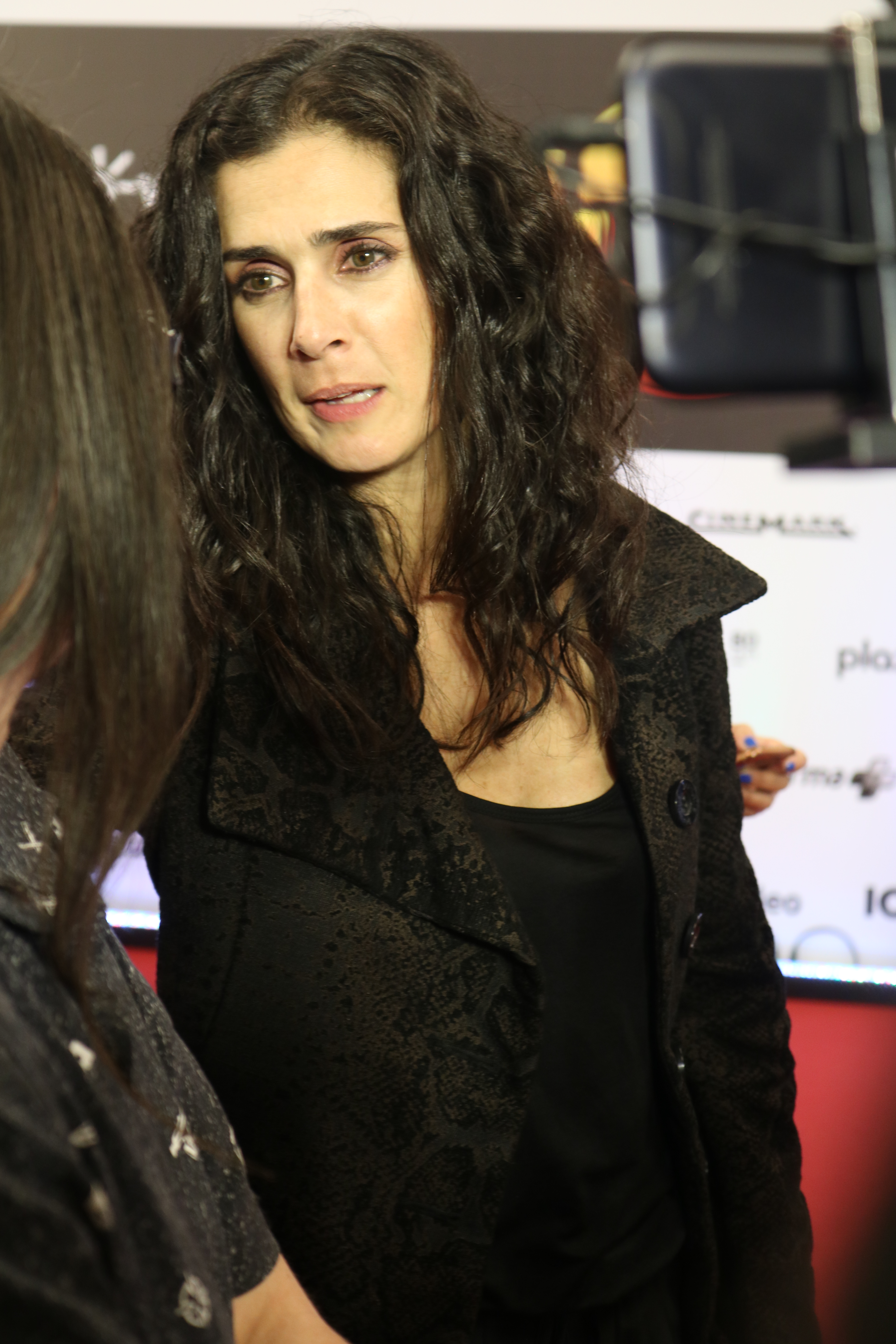 Vanessa Saba durante la alfombra roja de Asu Mare 3.